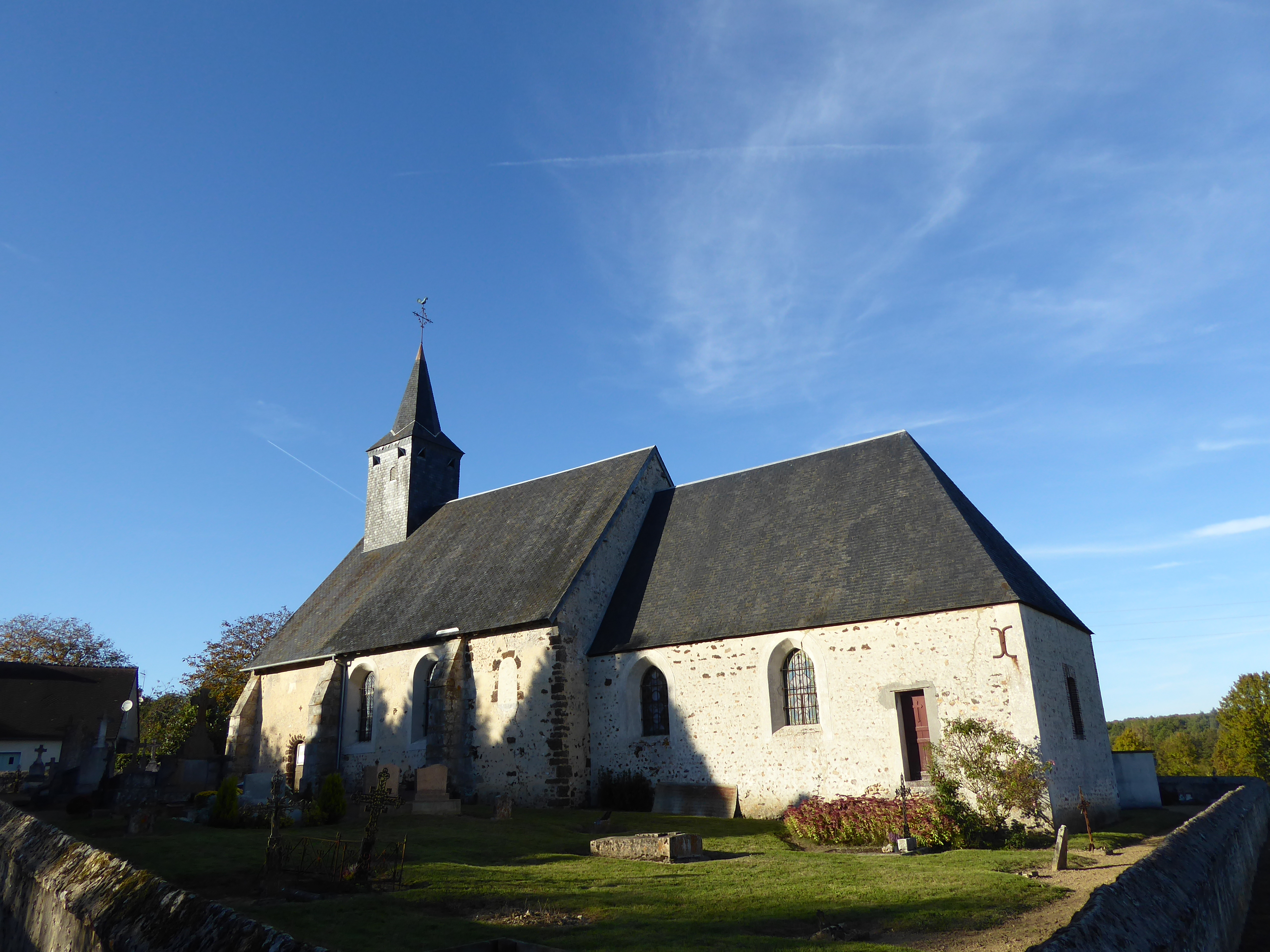 Église Saint-Jean-Baptiste de la Lande-sur-Eure, dans l'Eure-et-Loir.